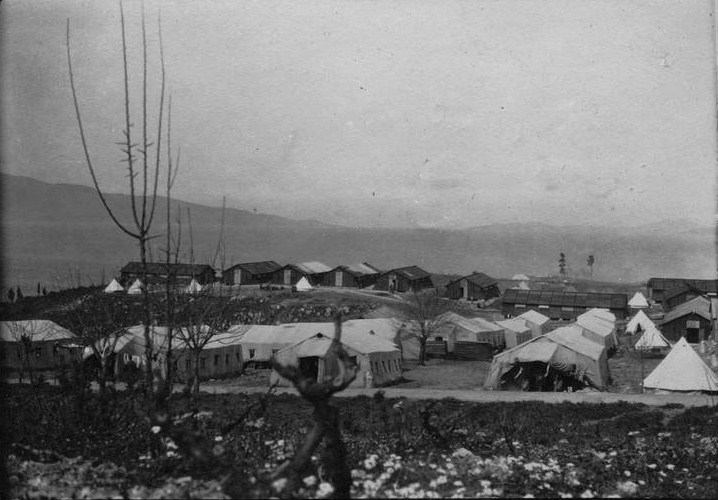 Vue générale de l'hôpital de campagne sur l'île des morts soldats serbes sur l'île de Vido .